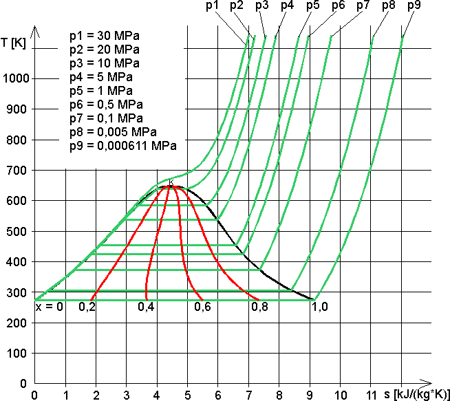 Przebieg izobar (krzywe koloru zielonego) wody i pary wodnej na wykresie T-s (temperatura - entropia); krzywa koloru czarnego - linia nasycenia, krzywe koloru czerwonego - linie stałego stopnia suchości pary mokrej